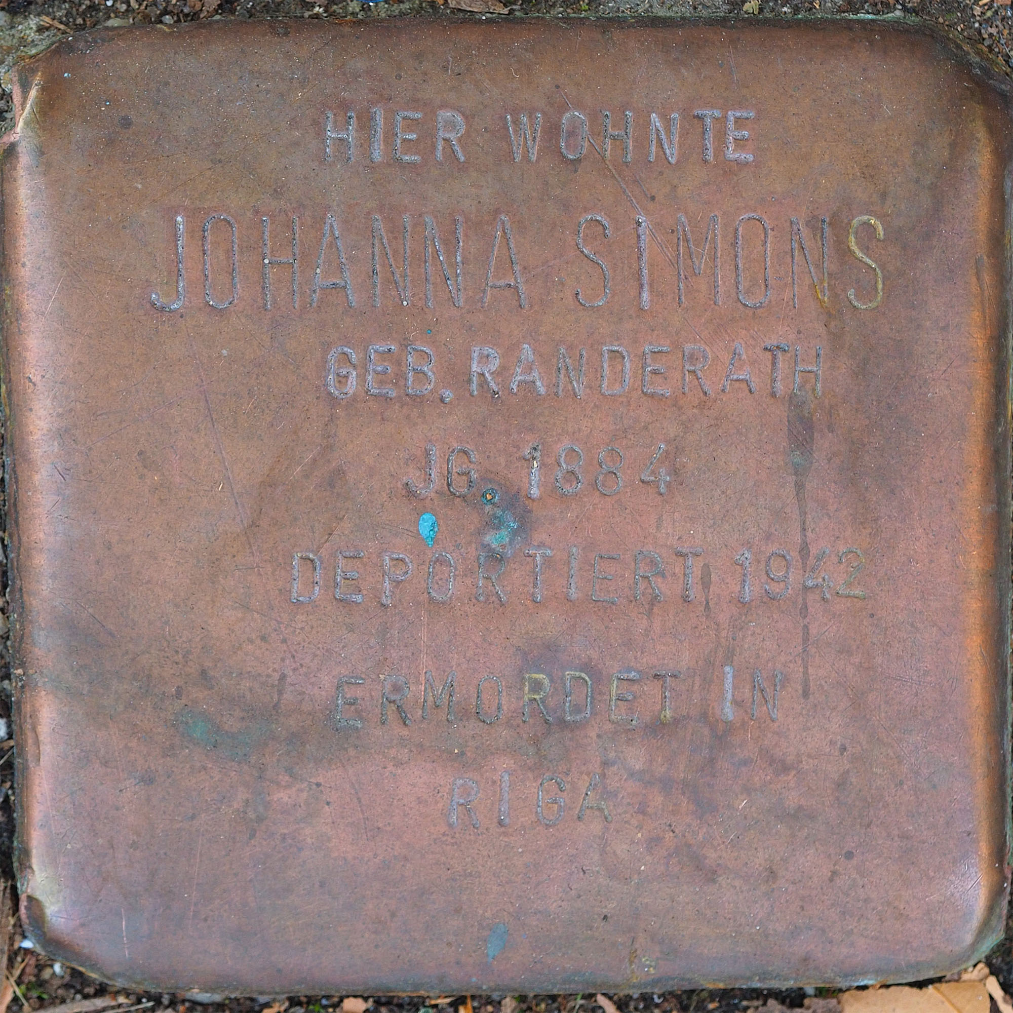 Stolperstein VIE: Simons, Johanna